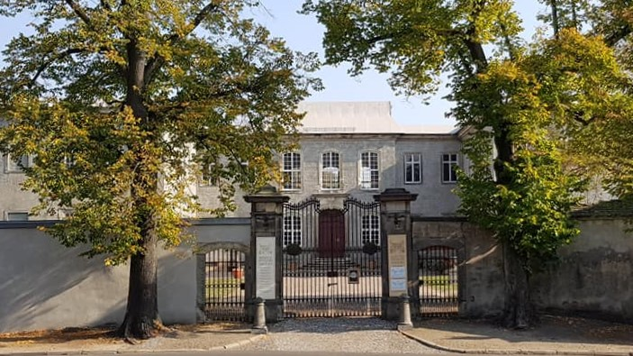 Eingang zum Schloss von der Straßenseite (Besuchereingang). Fotografiert aus der Lindenallee